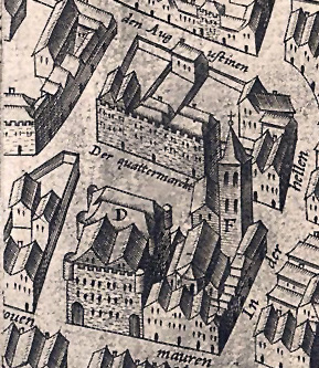 Ausschnitt eines Stadtplanes, St. Alban, Gürzenich, Quaternart (Köln)